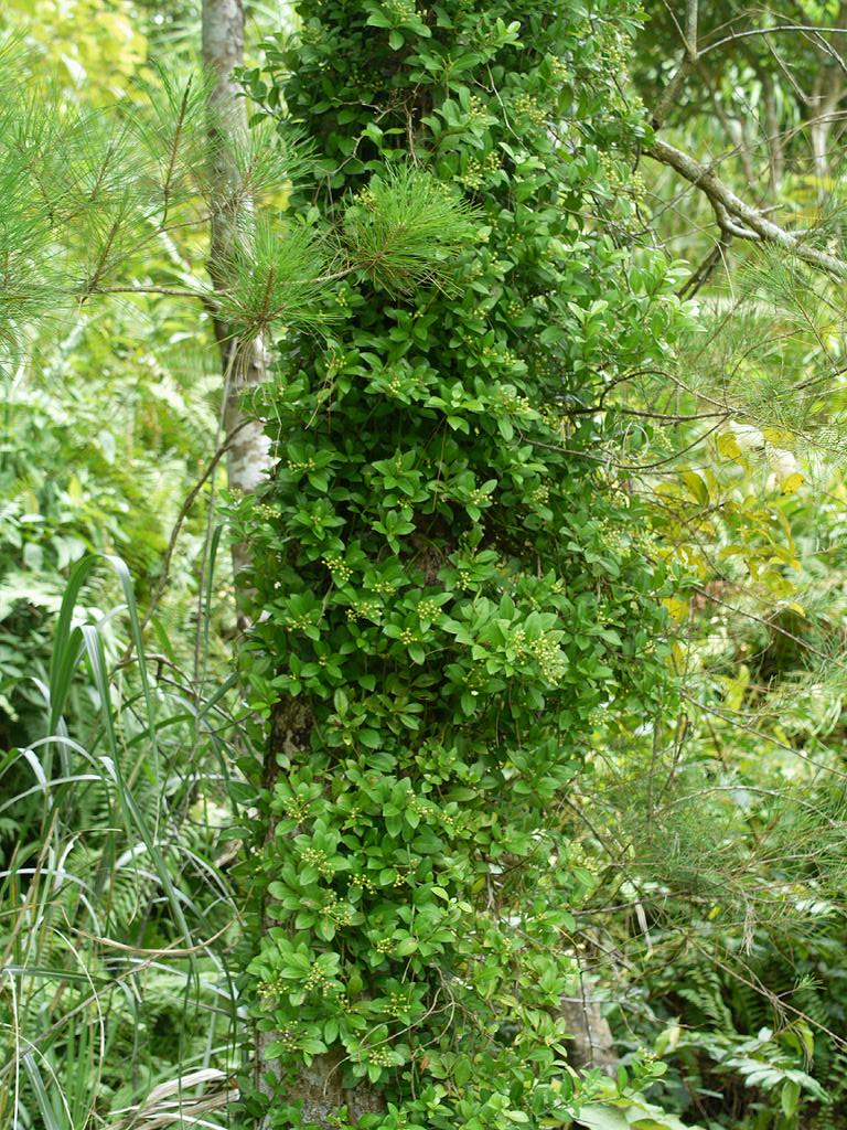 Psychotria serpens：シラタマカズラ 2008/08/12 沖縄本島：Okinawa Island, Japan